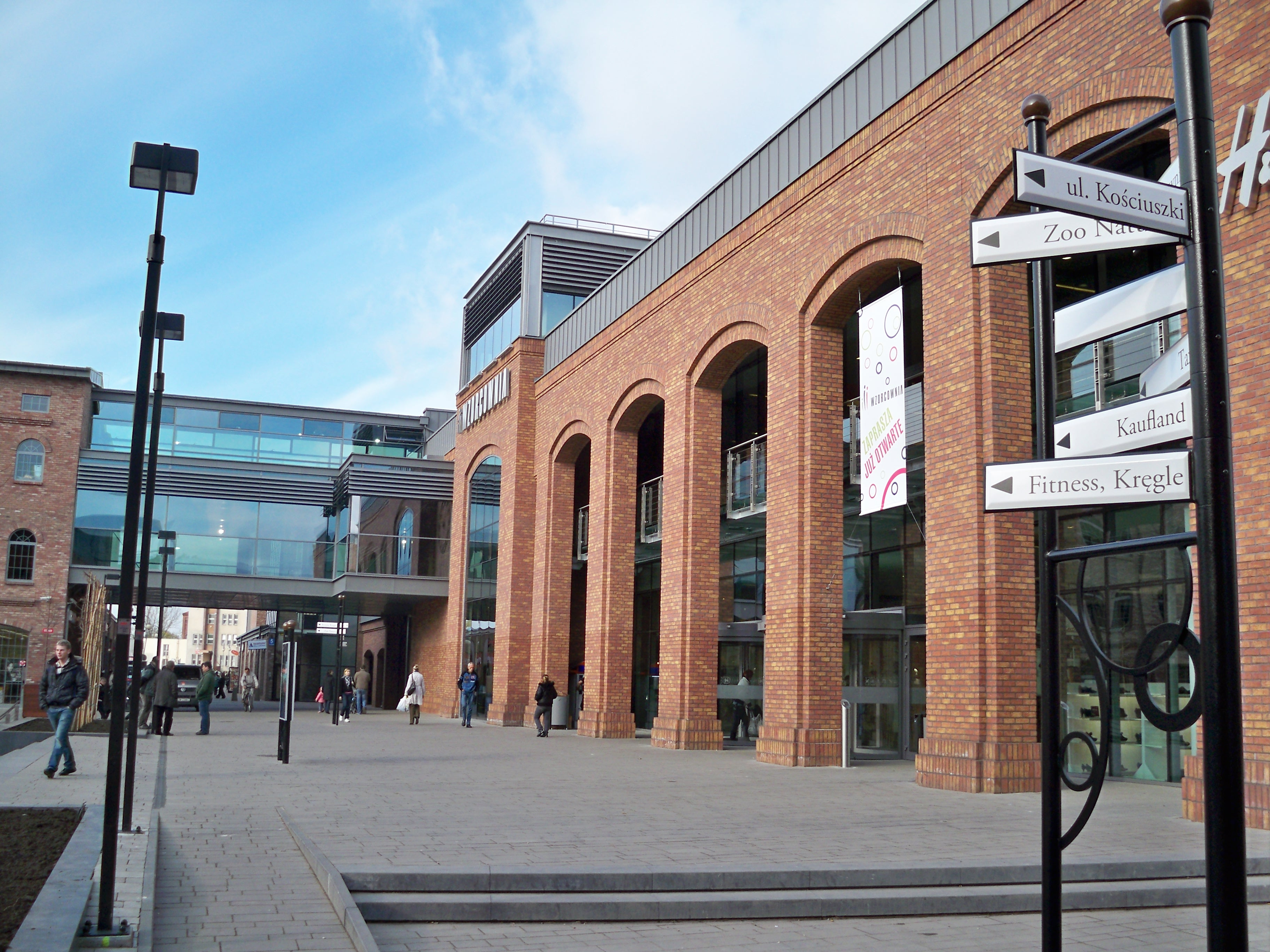 Wzorcownia Włocławek 2009 r.